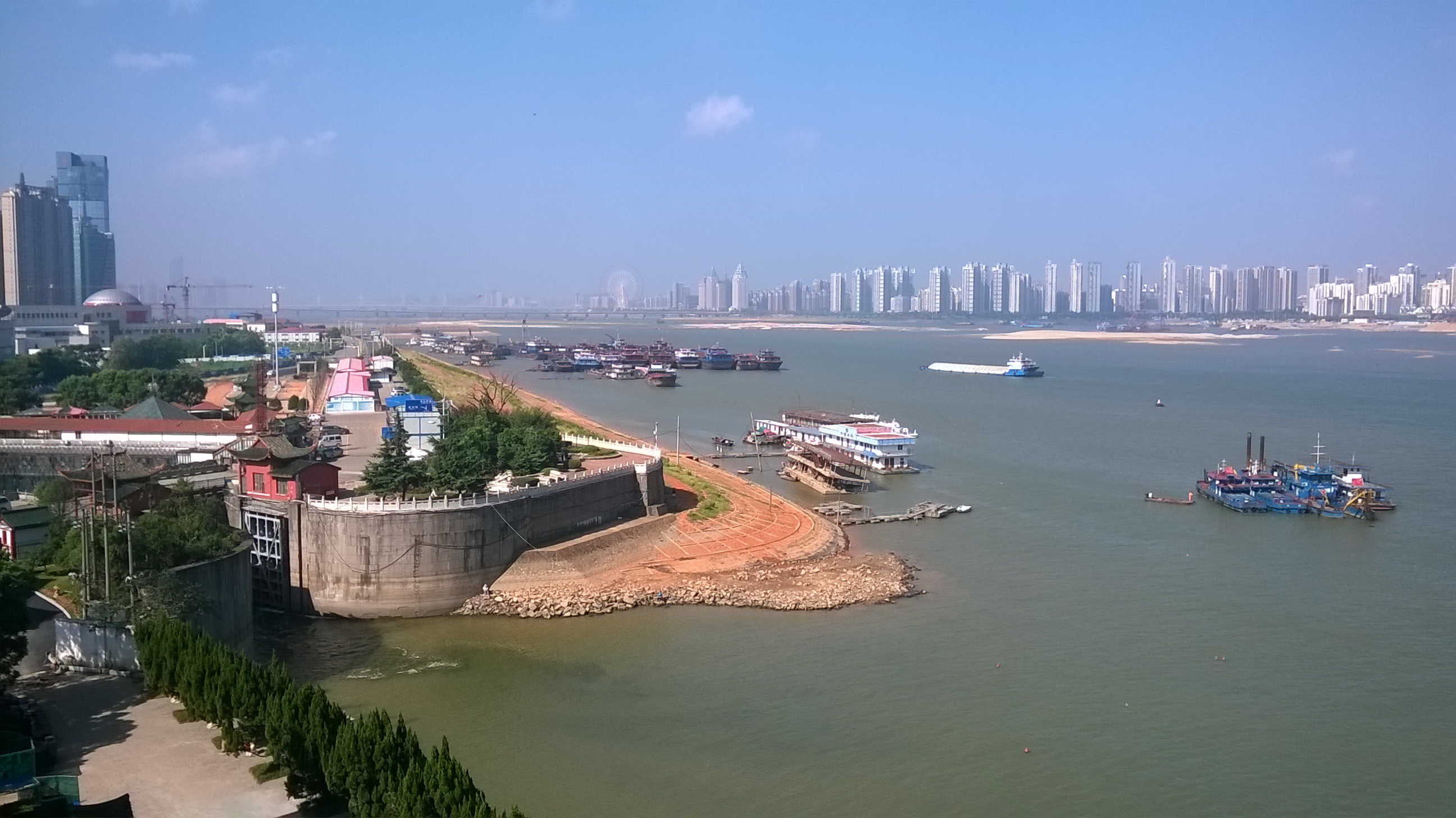 吴语: 南昌滕王阁看赣江